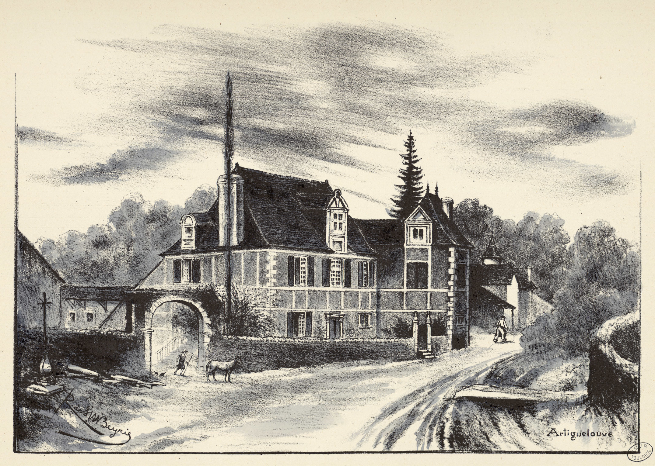 Ancely, René (1876 - 1966). Possesseur